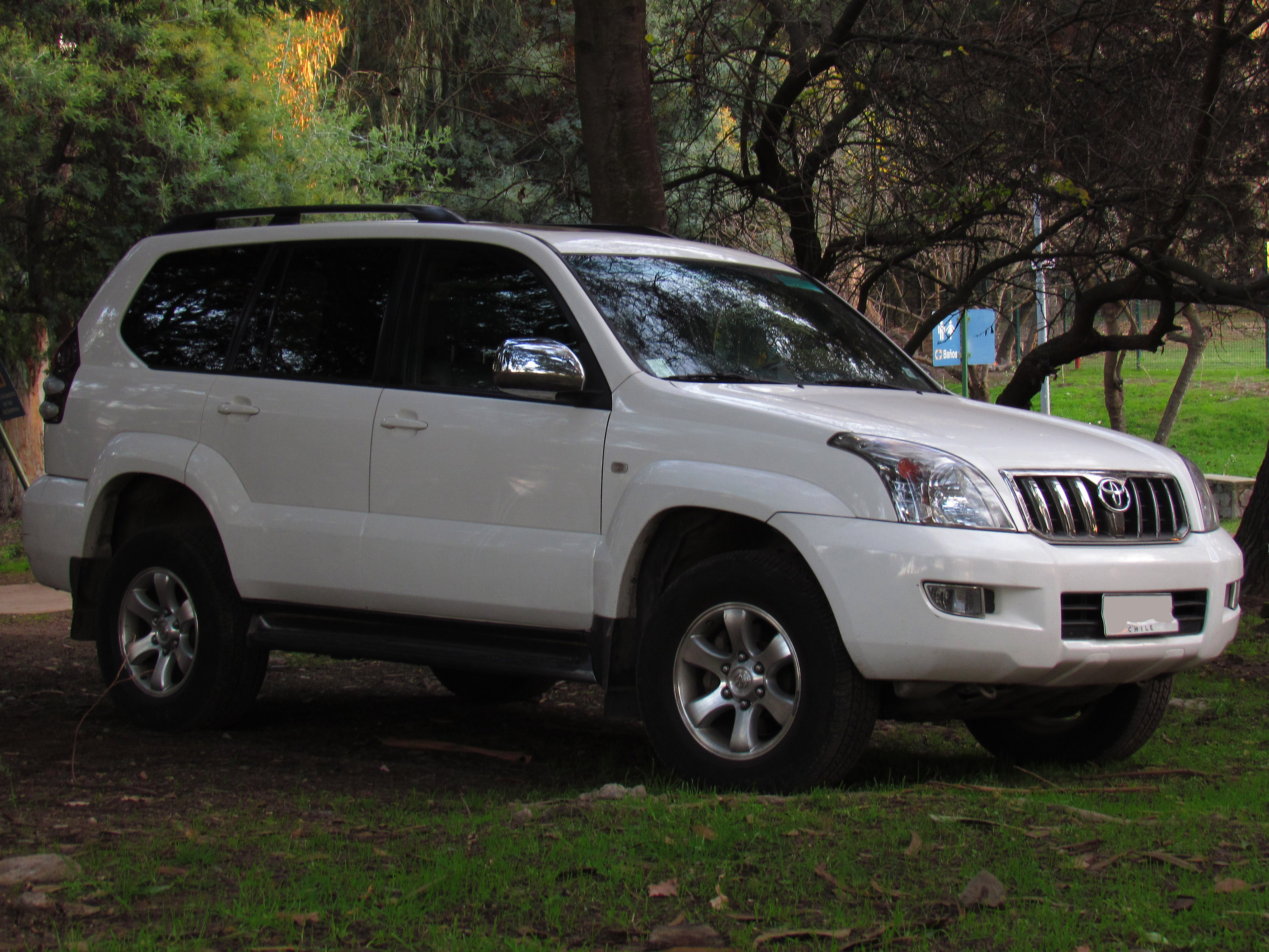 Toyota Land Cruiser Prado 4.0 VX 2009